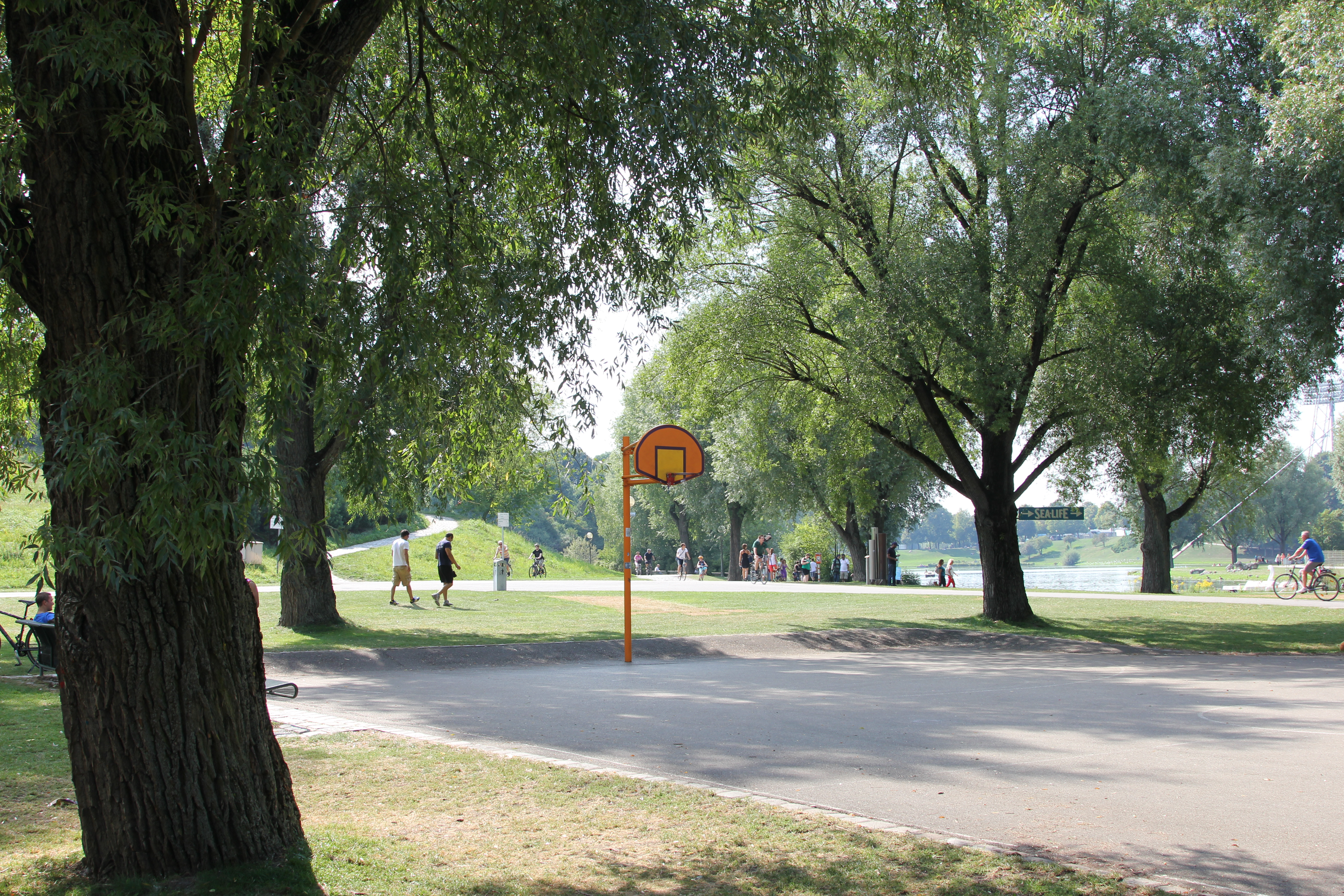 Basketballplatz im Olympiapark mit Blick auf den Olympiasee